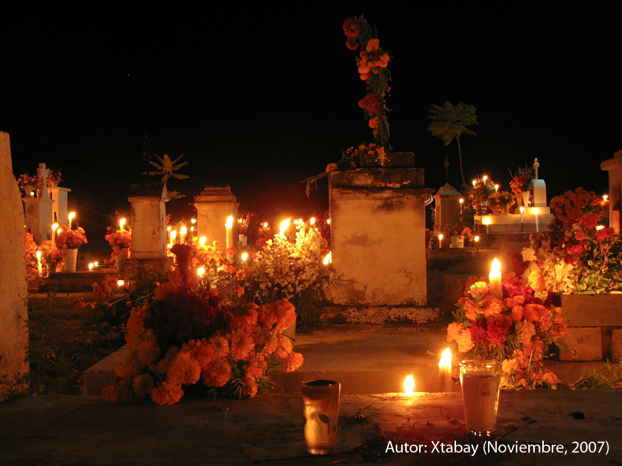 Celebración del día de difuntos. Panteón de El Rosario Micaltepec, Petlalcingo. Puebla, México.